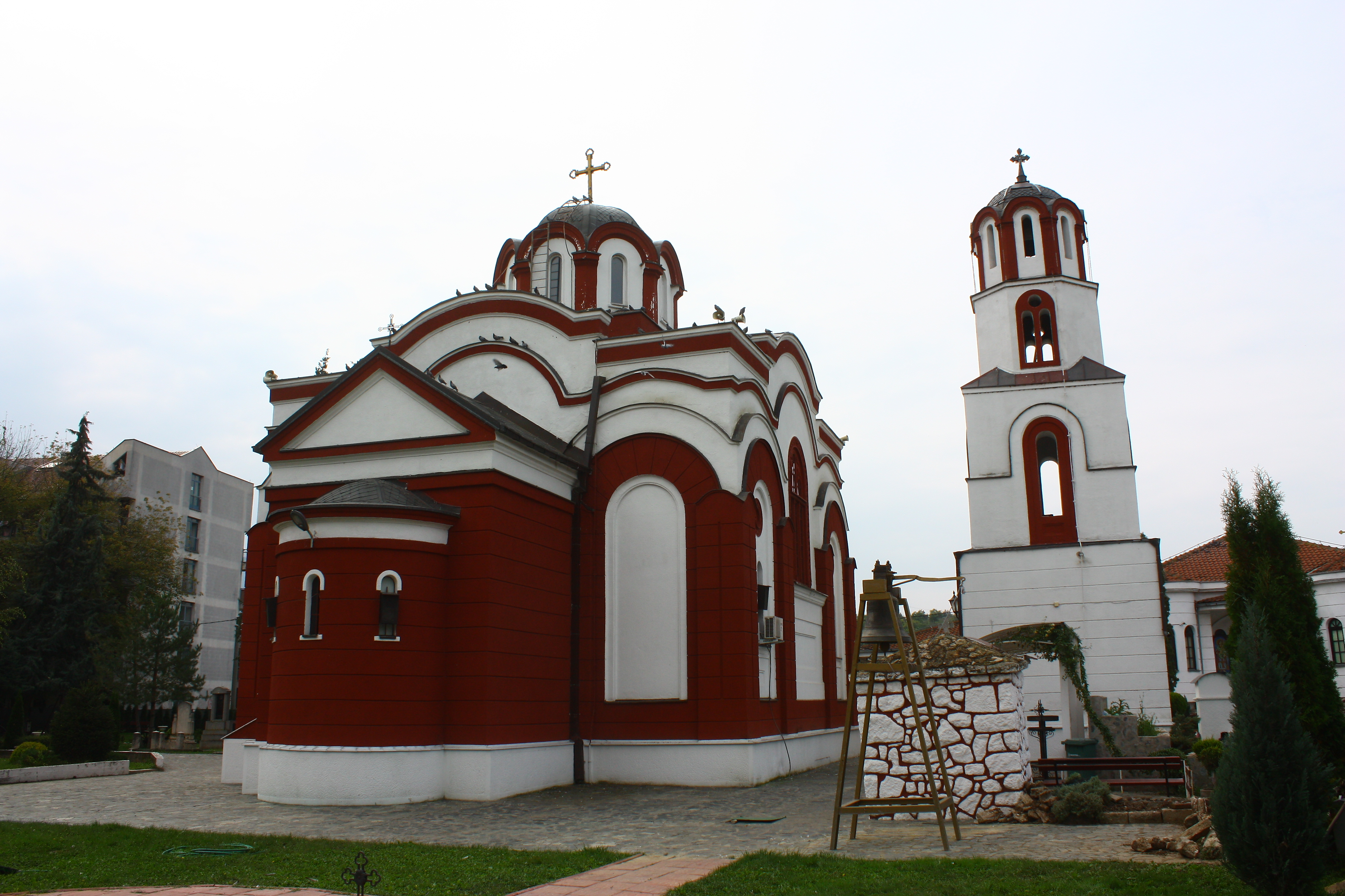 Црква Свети Арханѓел Михаил-Автокоманда-Скопје Ова е фотографија на споменик на културата во Македонија со типски код: А01This is a a photo of a cultural monument in North Macedonia with type id: А01